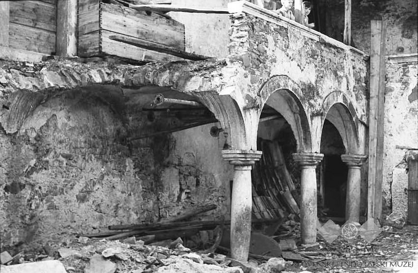 Jamškova stara hiša. Nad kalonami je gank - delno podrt - iz ganka vhod v "kuhno" in "kambre", zgoraj kašča, Goče.